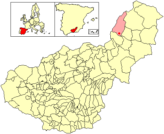 Situación de la localidad de Fuente Vera (en el municipio de Castril) respecto a la provincia de Granada, en España.